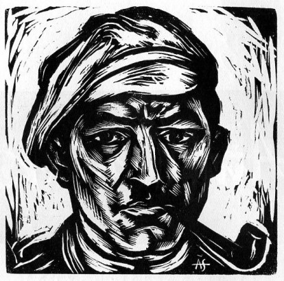 Antonín Václav Slavíček – Vlastní podobizna, (1926)